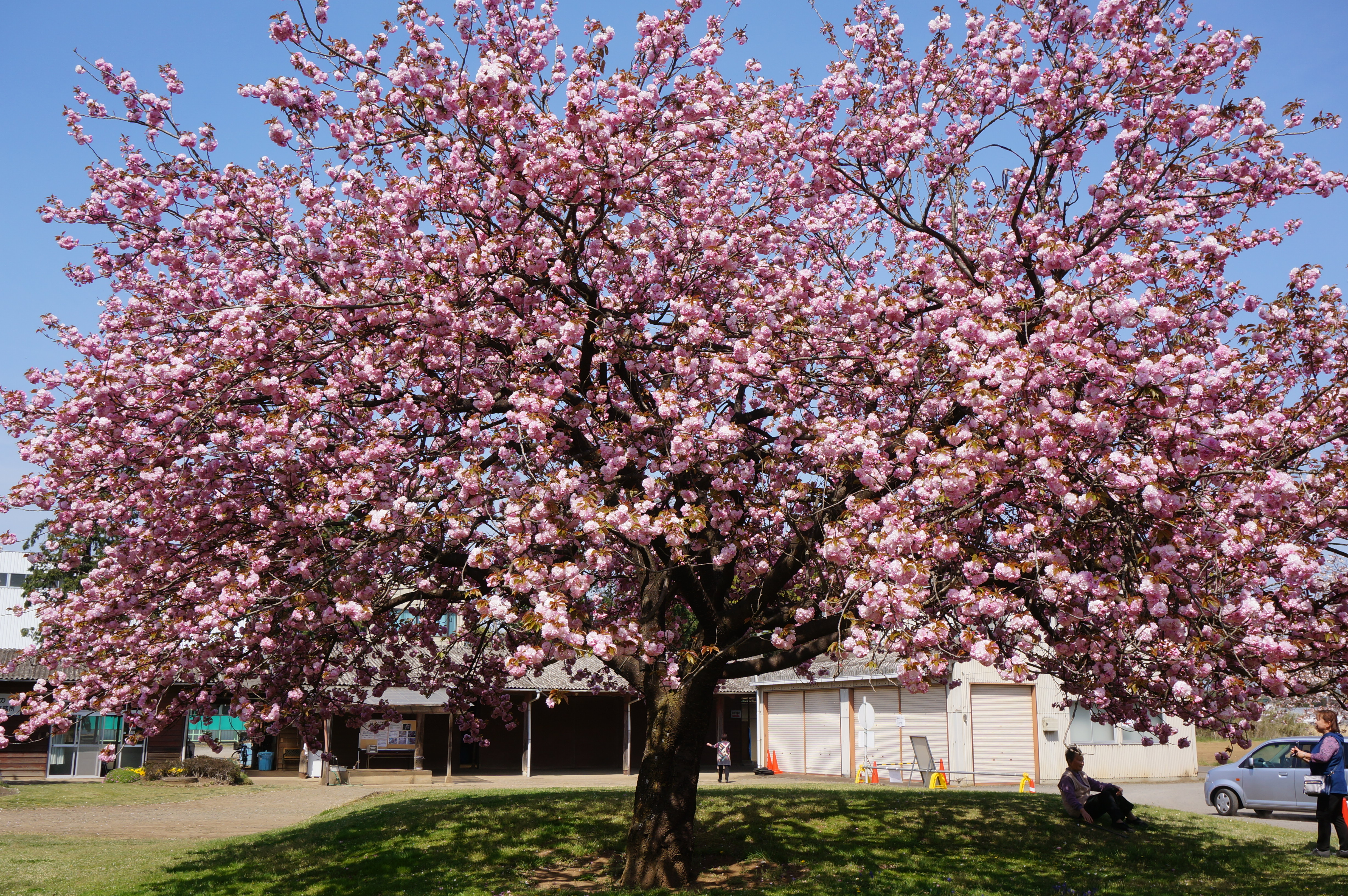 日本花の会結城農場さくら見本園にて